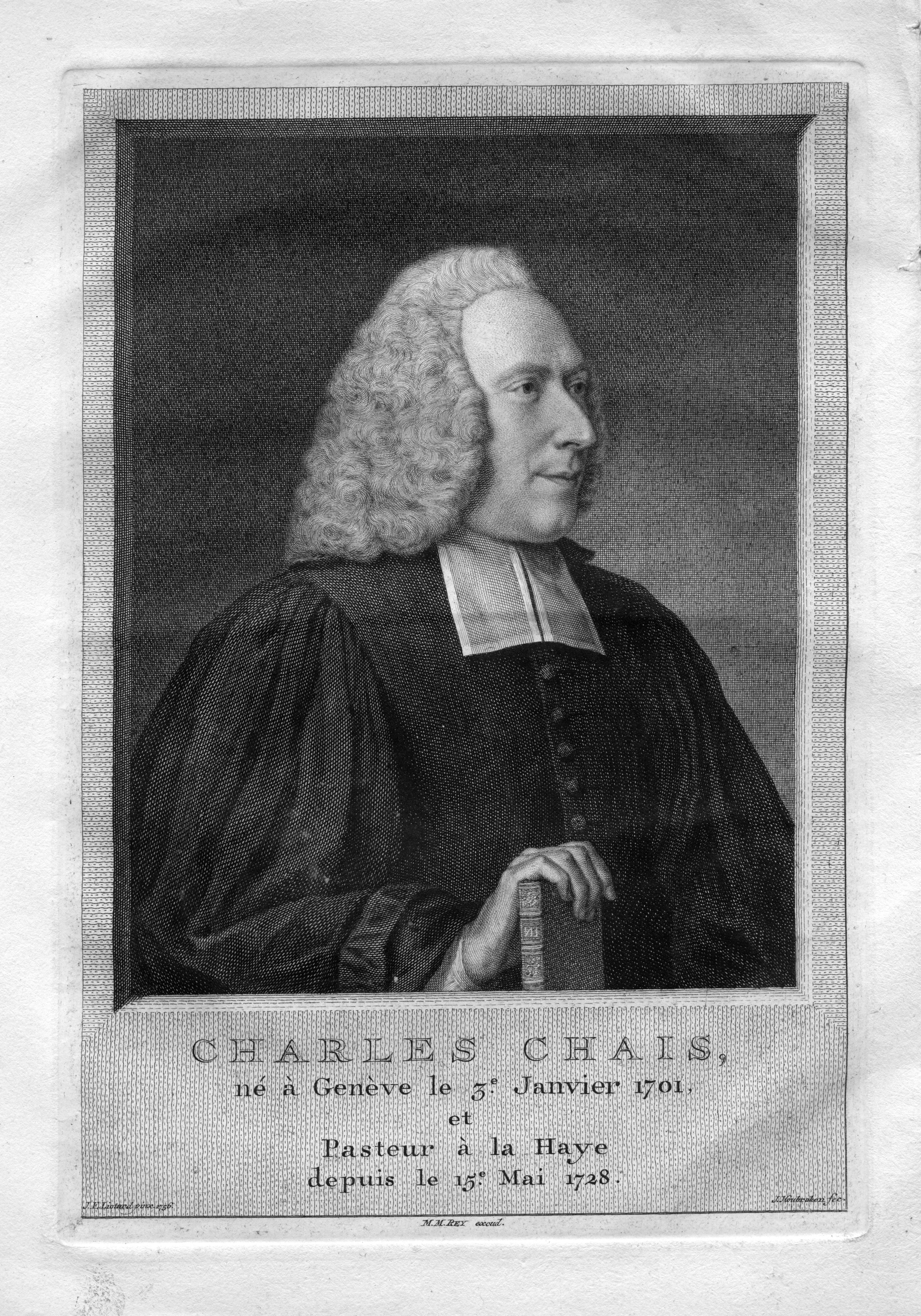 portrait gravé